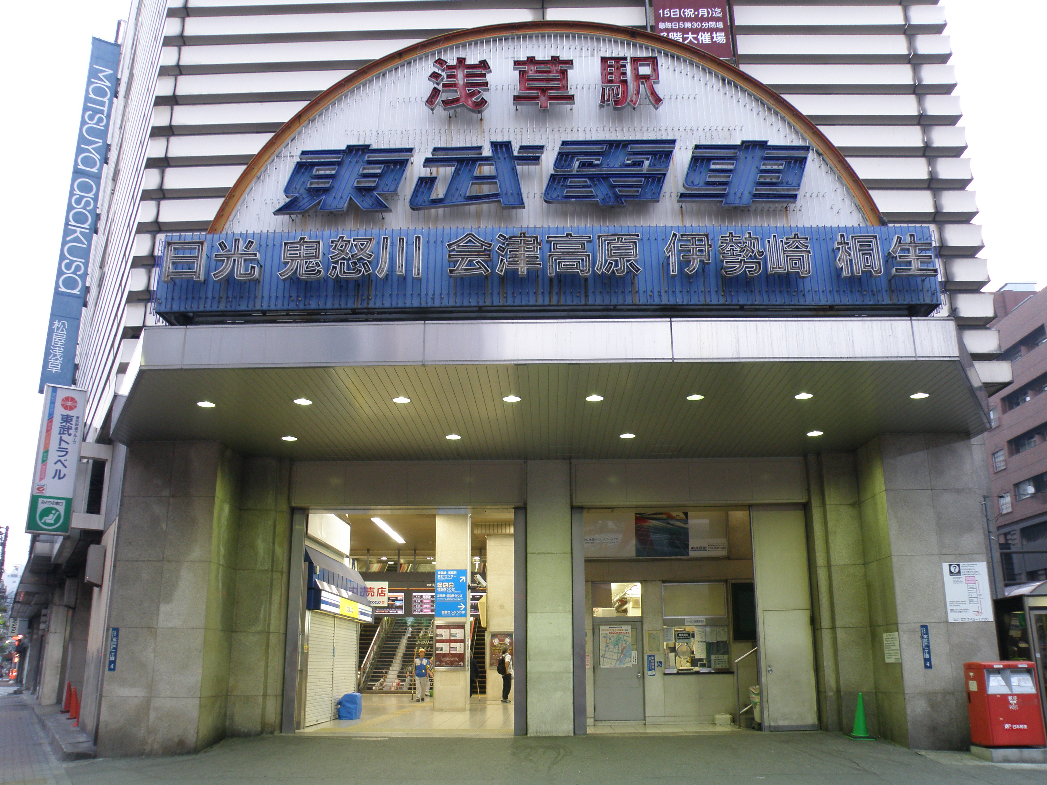 東武浅草駅